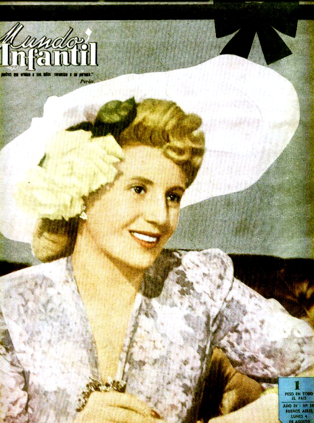 Ley 11.723 en Argentina. Foto de "Eva Duarte de Perón" en revista Mundo Infantil, publicación año 1952